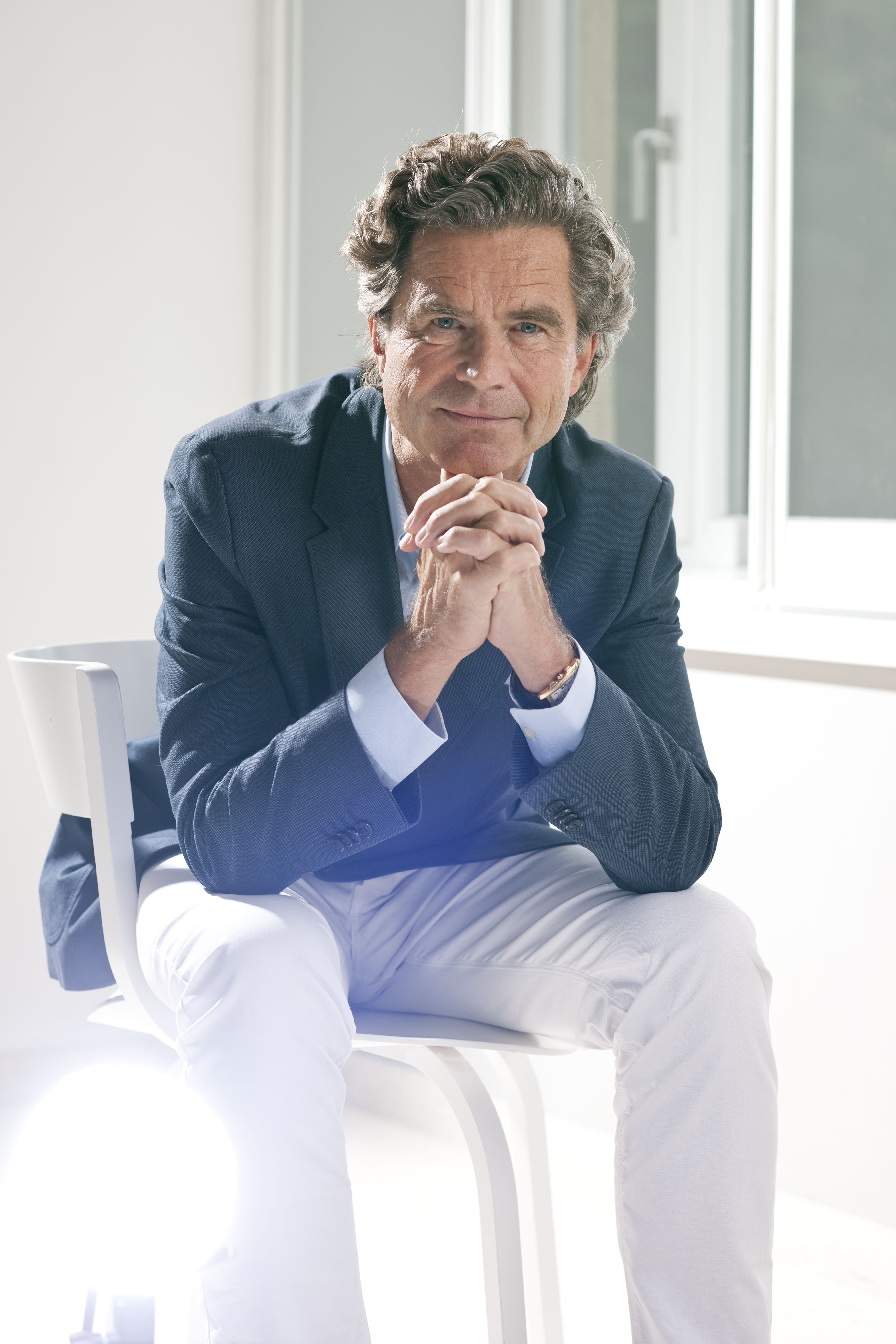 Florian Langenscheidt Fotograf: Florian Jaenicke